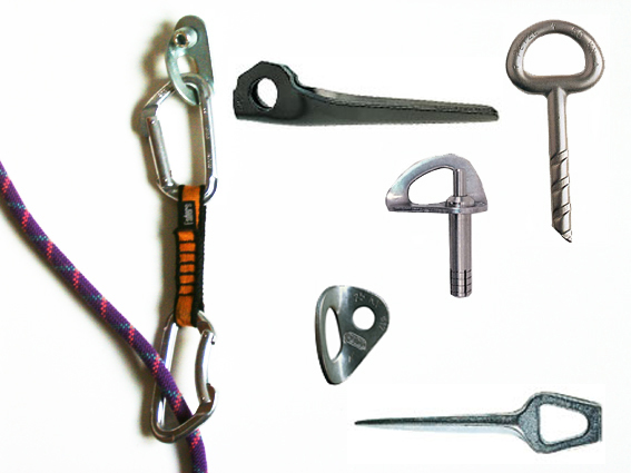 Gebruik van een klimhaak naast enkele klimhaken